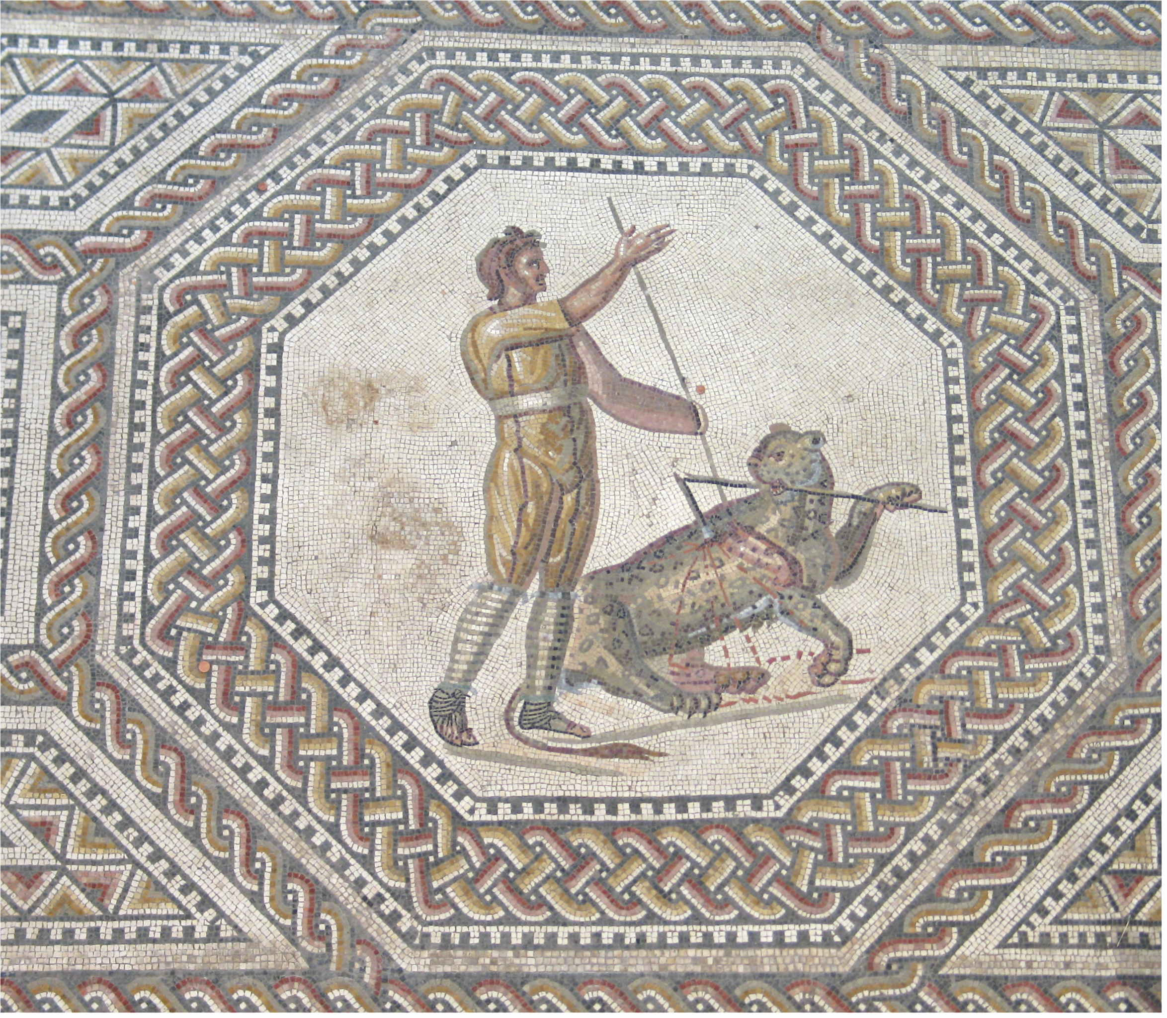 De réimesche Mosaik vu Nennig